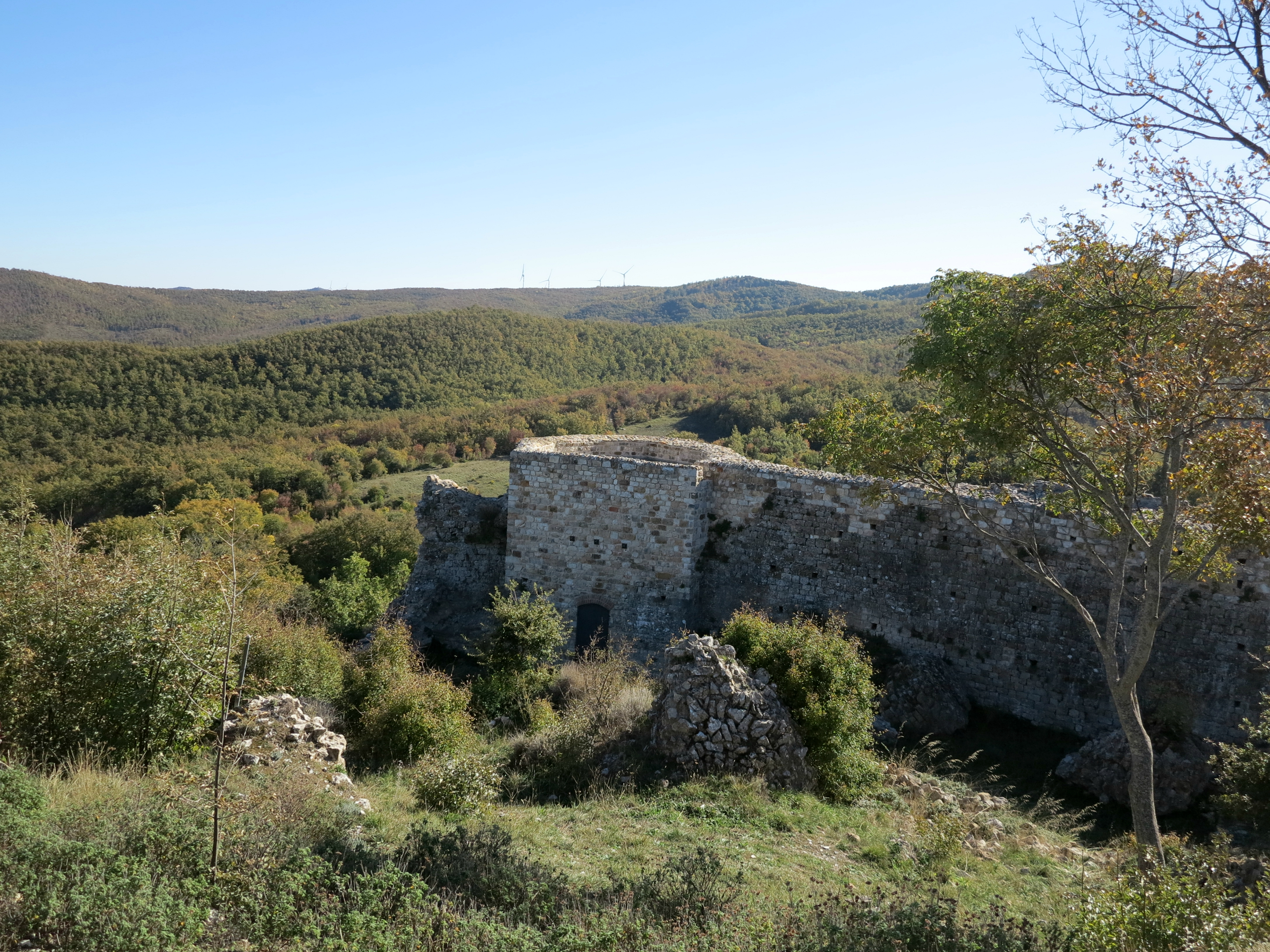 Rocca di Pietracassia (Lajatico)